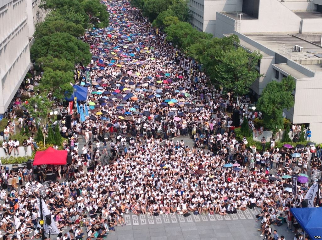 香港大專學生罷課